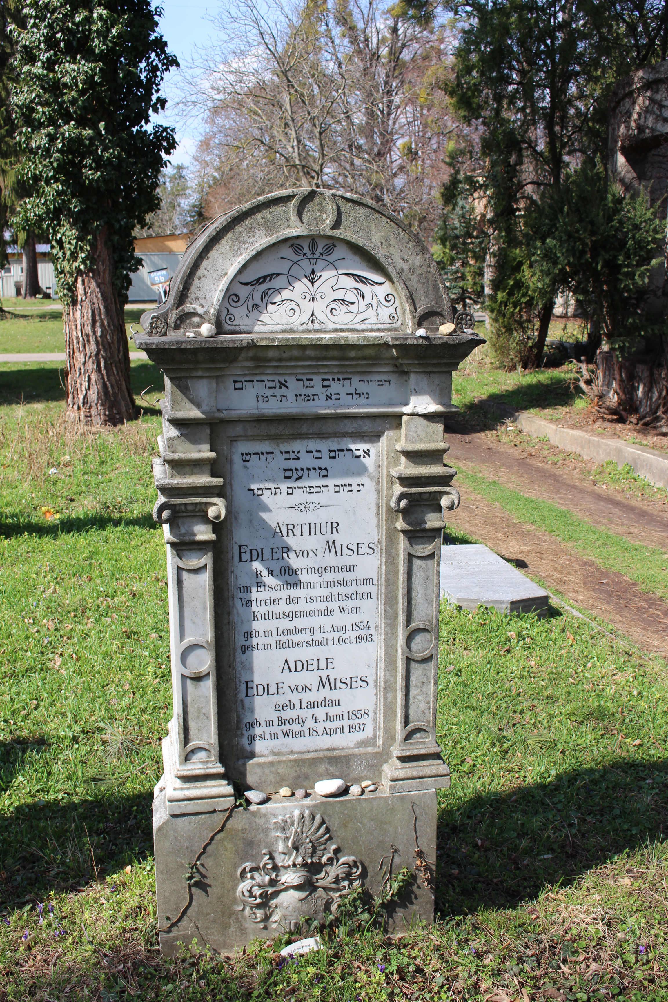 Grab der Eltern des Ökonomen Ludwig von Mises auf dem Zentralfriedhof Wien, alte isr. Abteilung, Gruppe 5b (Abteilung), Reihe 15, Grab No. 1c.